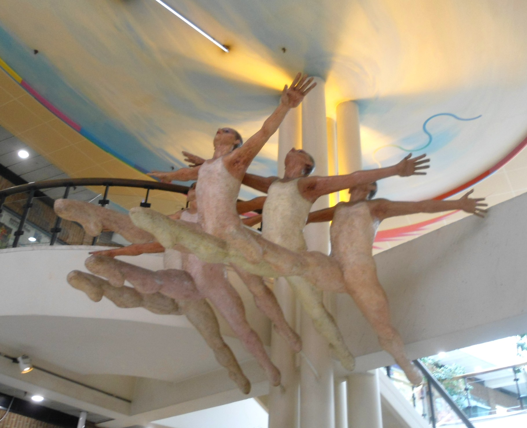 Les Danseurs de Mady Andrien (1981). Galerie Opéra à Liège